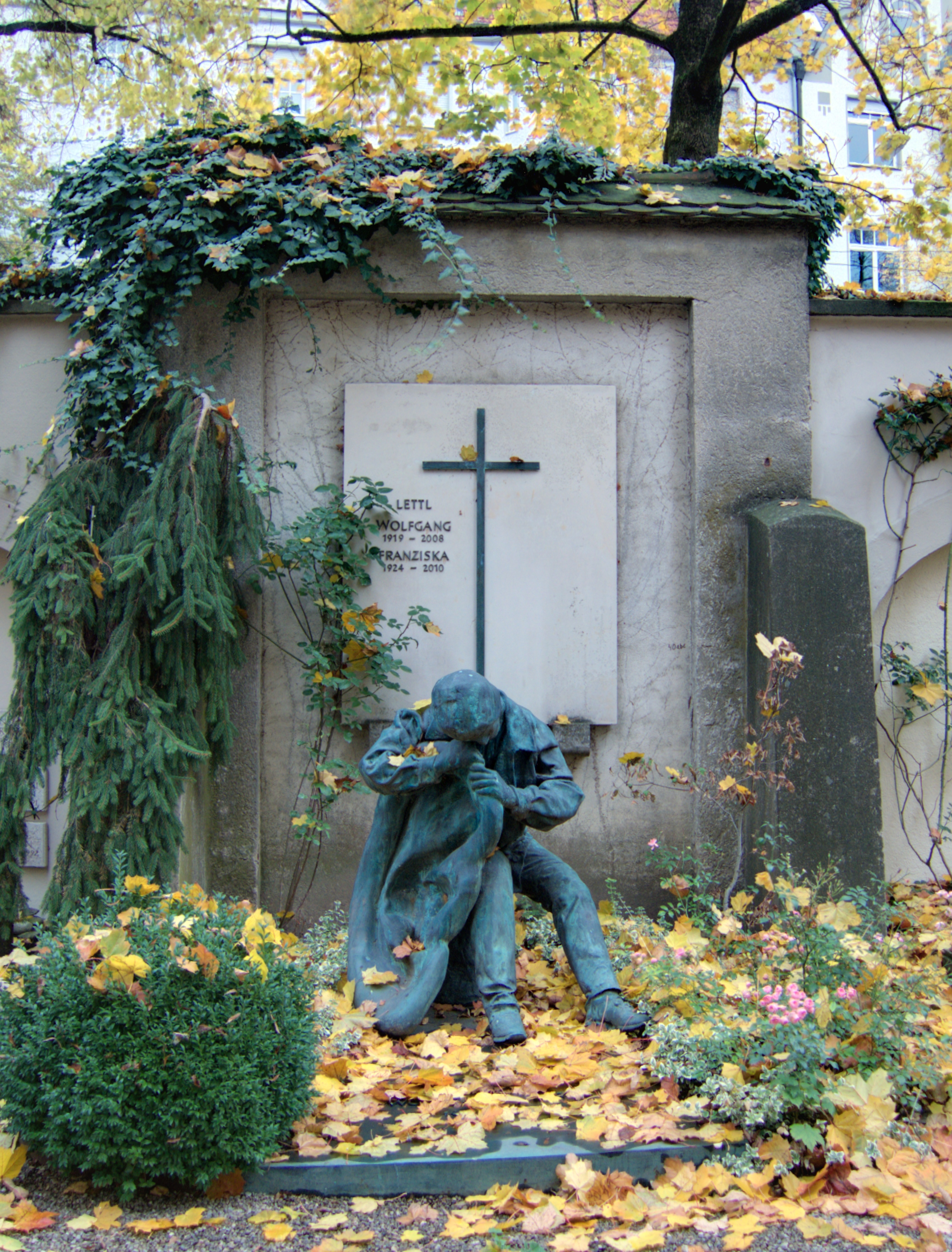 Grab von Wolfgang Lettl auf dem Friedhof an der Hermanstraße in Augsburg. Gesamtansicht. Aufnahme aus NordWest.